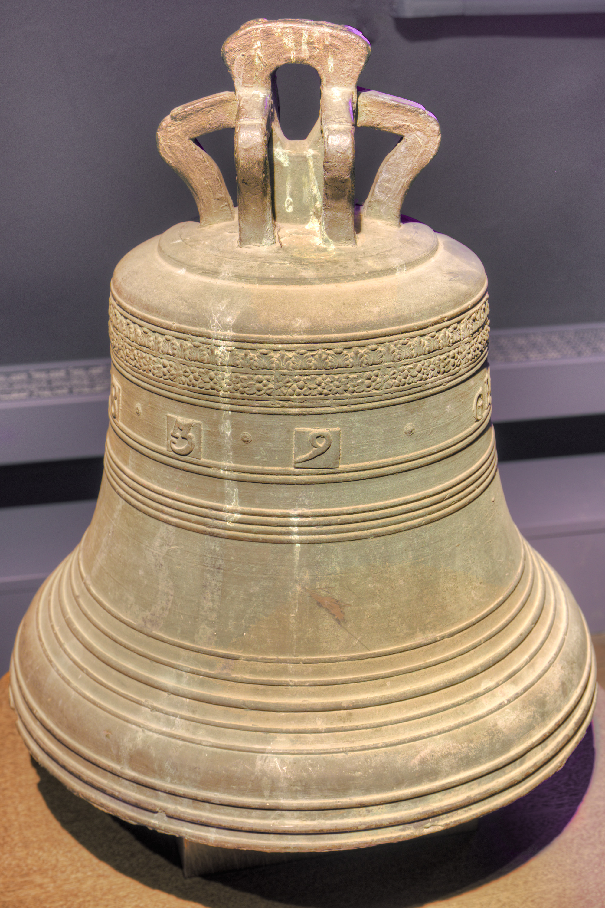 Glocke des ehemaligen Uhrwerks im Turm der Prosteikirche St. Petrus und Andreas in Brilon; gegossen 1839 von Briloner Glockengießern Jacob Greve und Heinrich Humpert. Diese Glocke wurde mit einem Hammer angeschlagen (kein Klöppel).